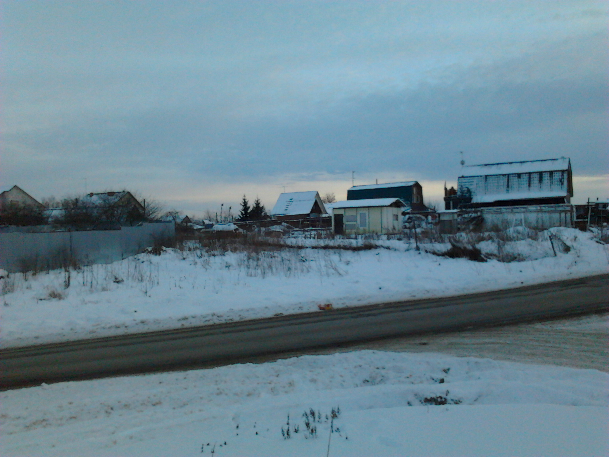 Деревня Кутьино